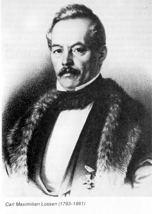 Hüttenbesitzer Carl Maximilian Lossen, Gründer der Concordiahütte Bendorf